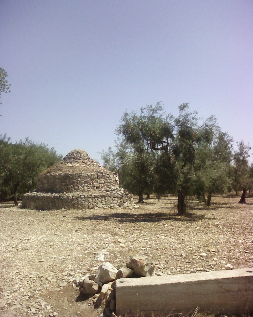 campagna-ulivi+casedda - Modugno (bari)-Italy